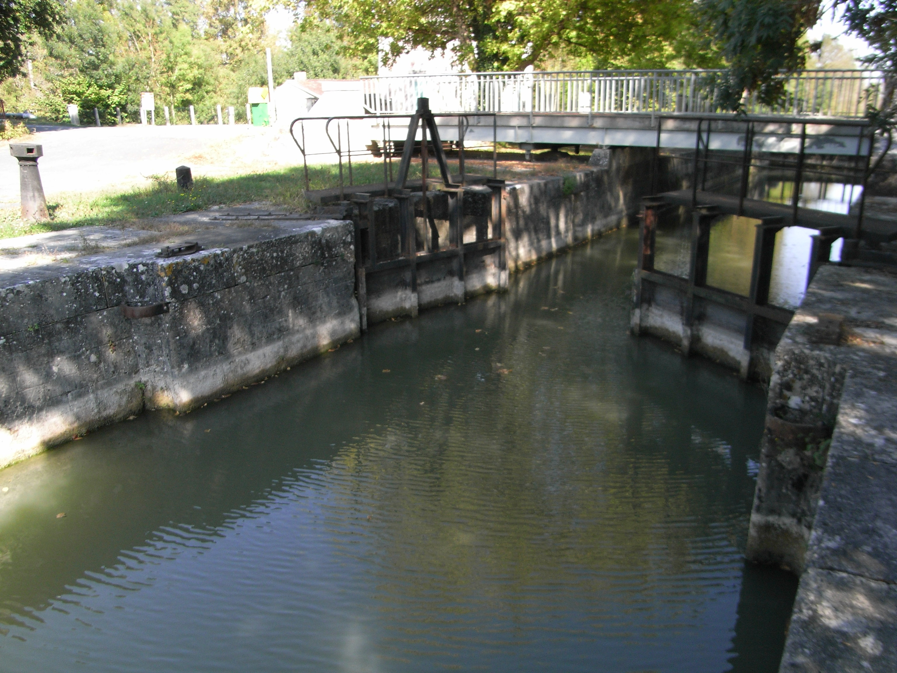 Écluse et pont tournant (en arrière-plan) sur la Boutonne située à Bel-Ébat en Charente-Maritime (France).